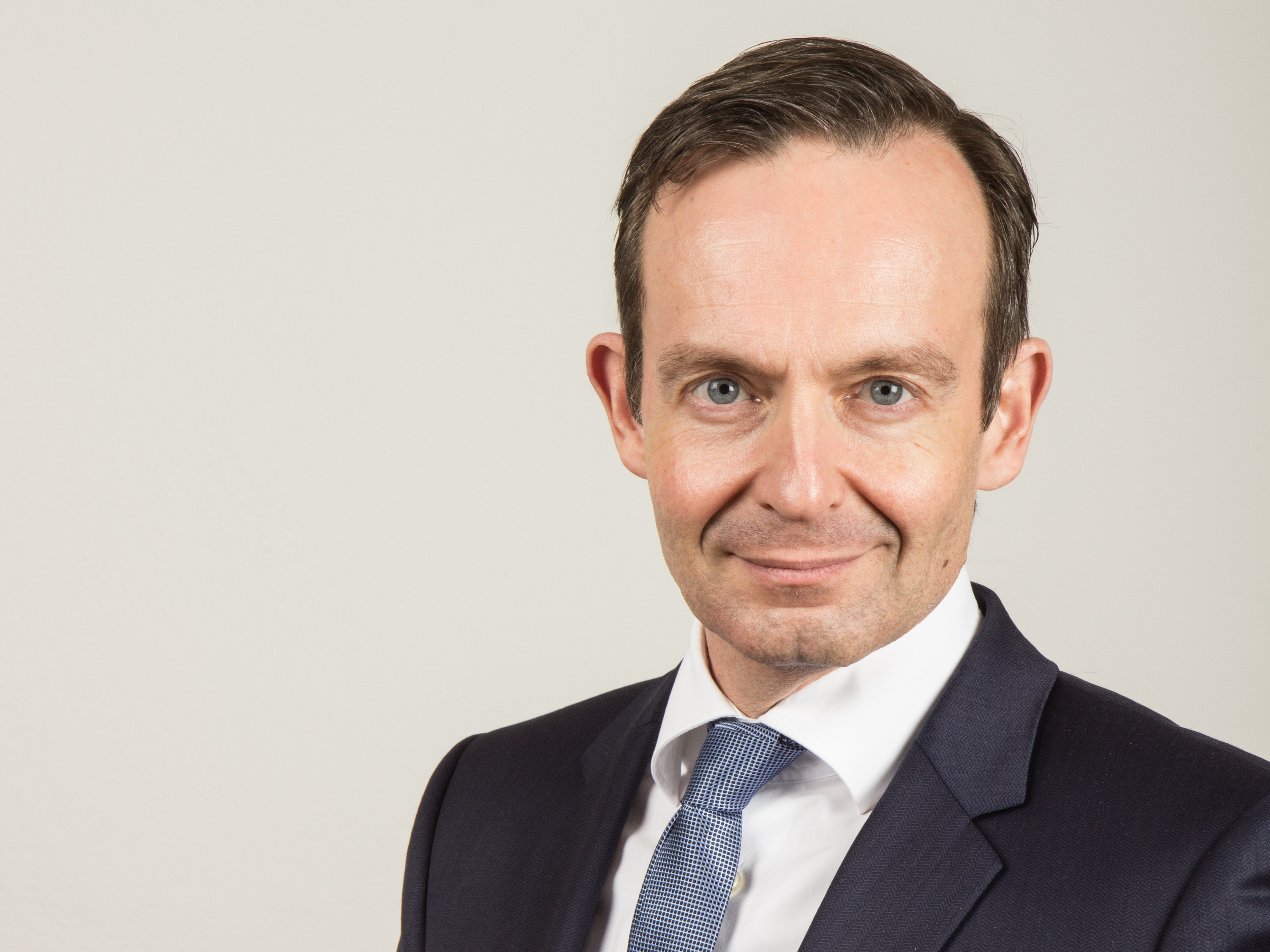 Der rheinland-pfälzische Minister Volker Wissing